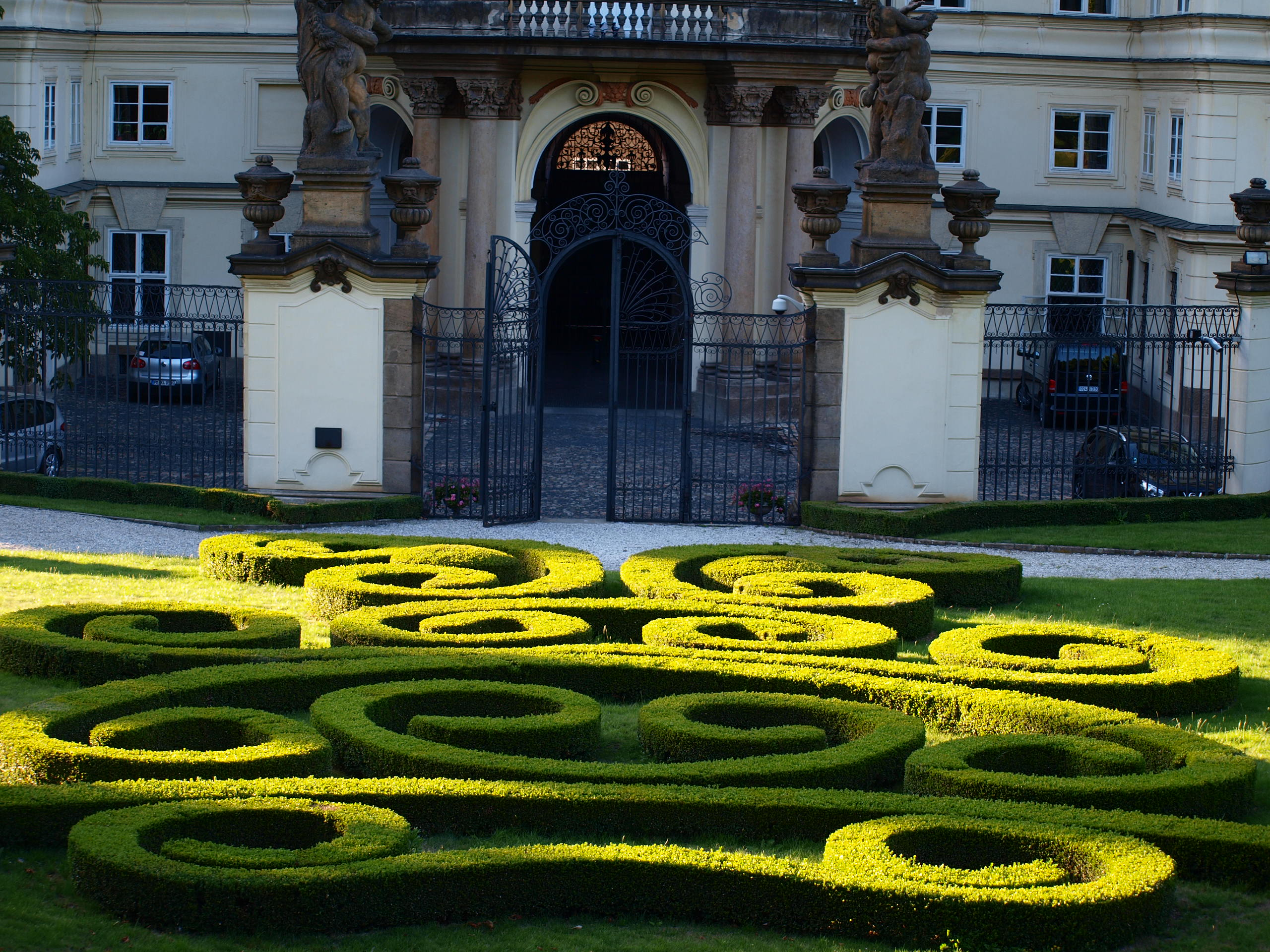 Lobkovický palác Malá Strana